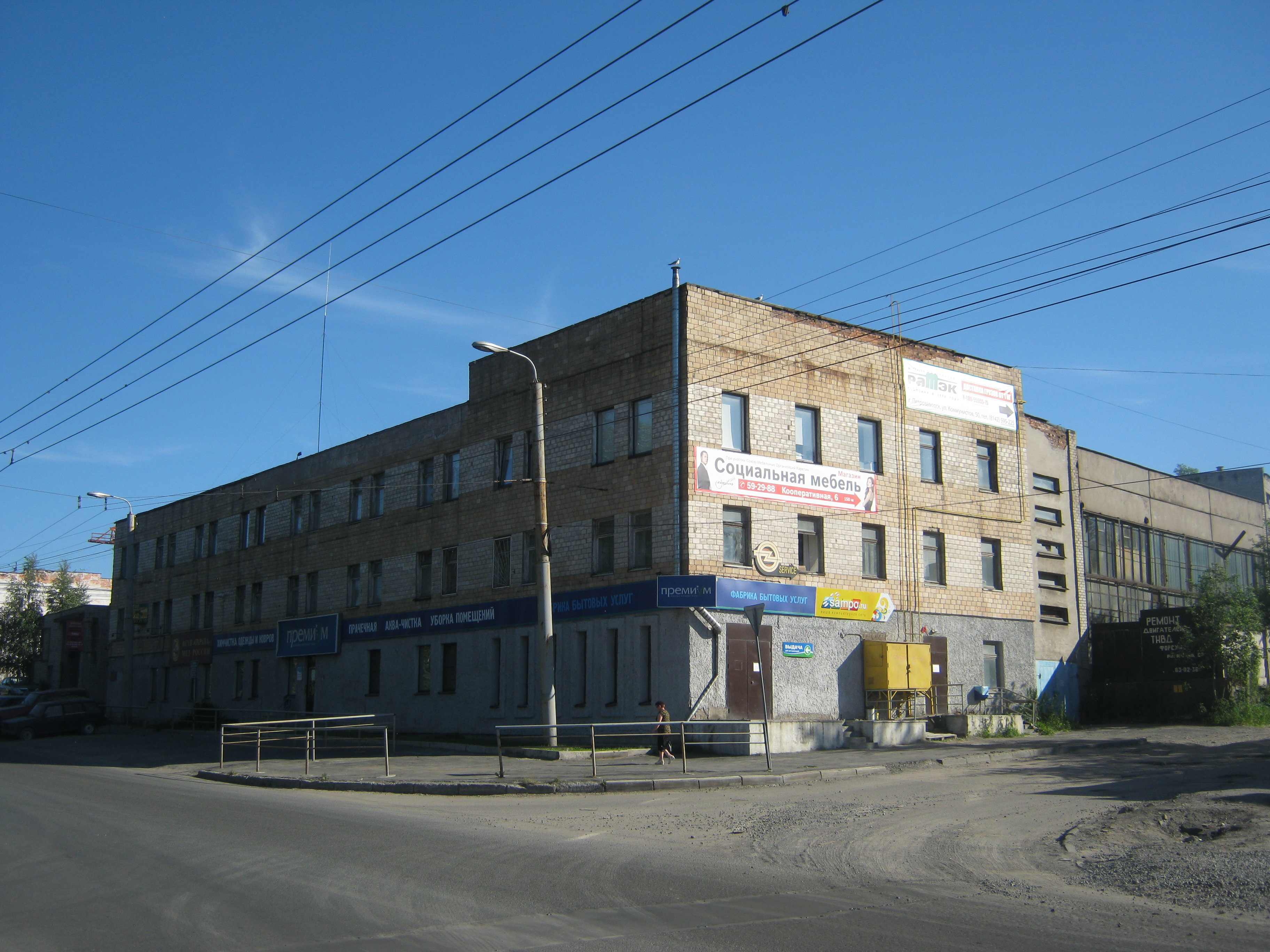 Промышленность Петрозаводска